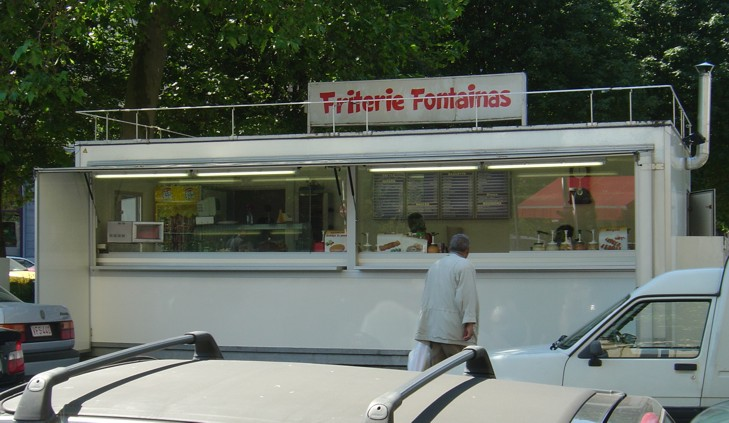 Fritkot in Brussels (Saint-Gilles)